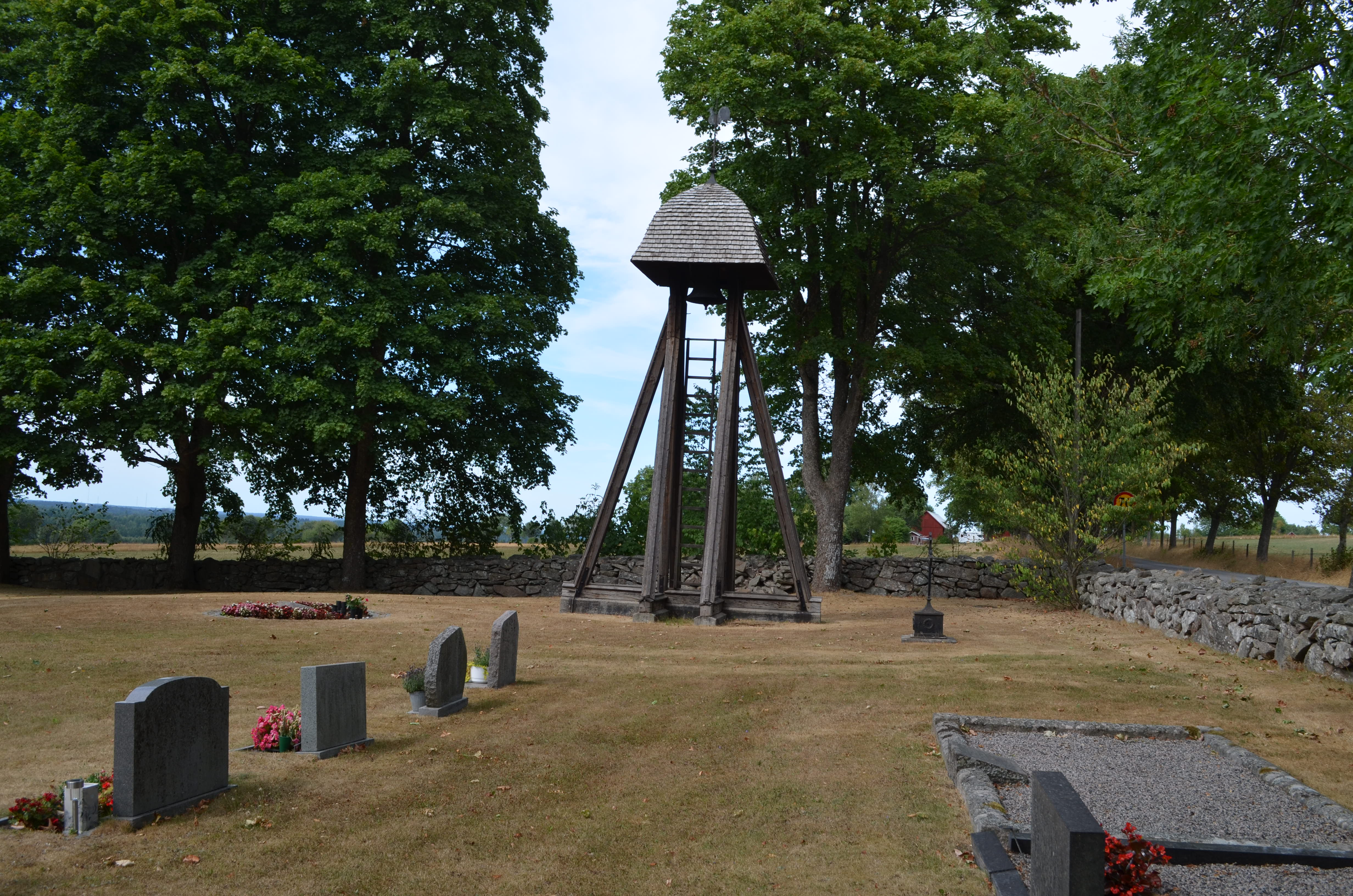 Västra Torsås gamla kyrka och kapells klockstapel